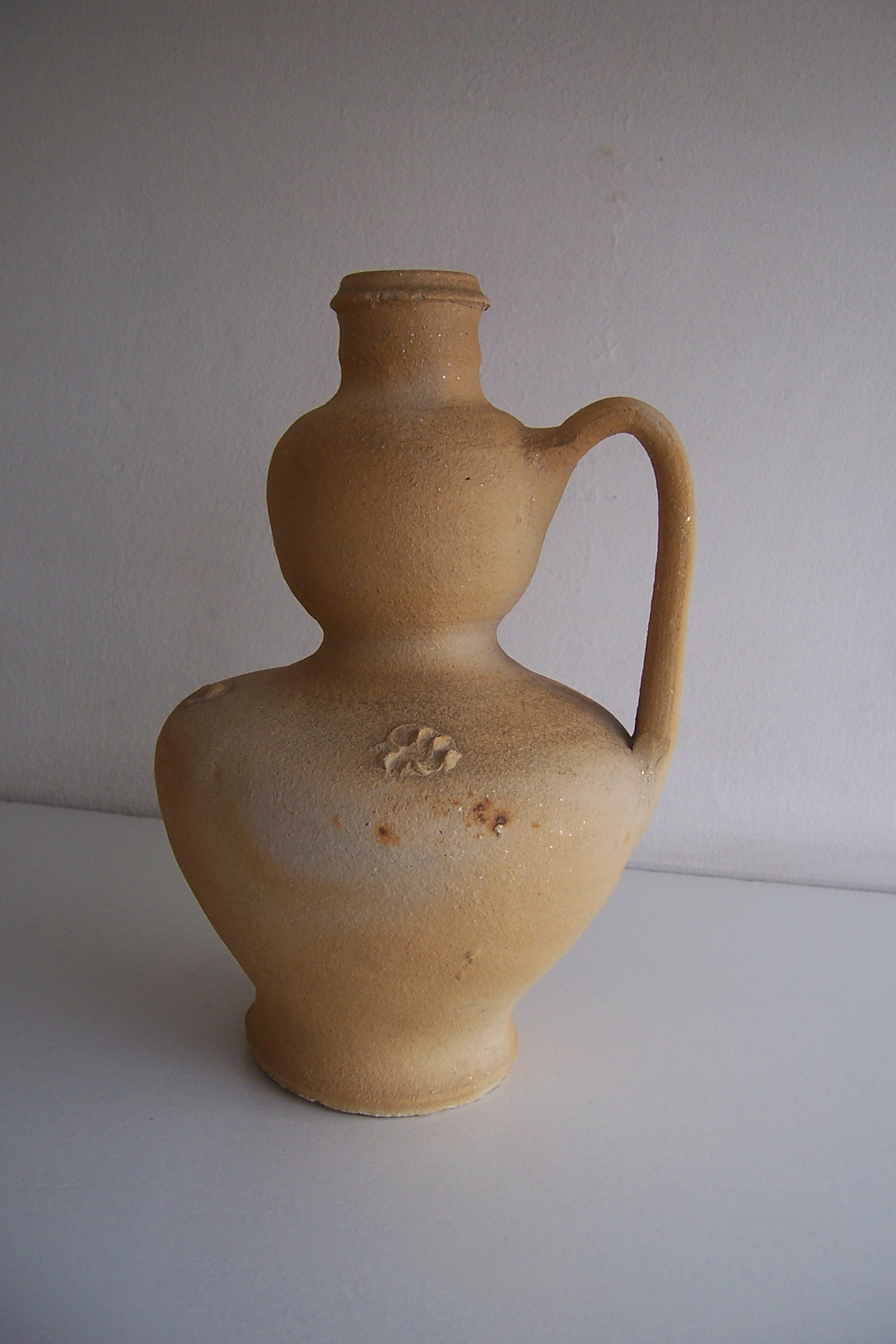 Alfarería de Moveros (Zamora, España). Cántaro de un asa, con boca estrecha y cuello englobado, que le diferencia del resto de los cántaros españoles; pieza típica de esta localidad del antiguo Reino de León, en el noroeste español.